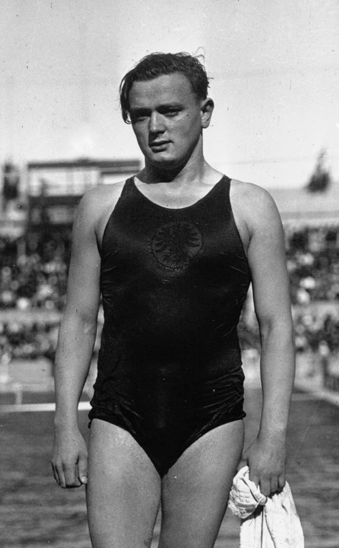 Les Tourelles : Championnats d'Europe : Deutsch (Allemagne) (portrait à 3 m) : [photographie de presse] / Agence Meurisse